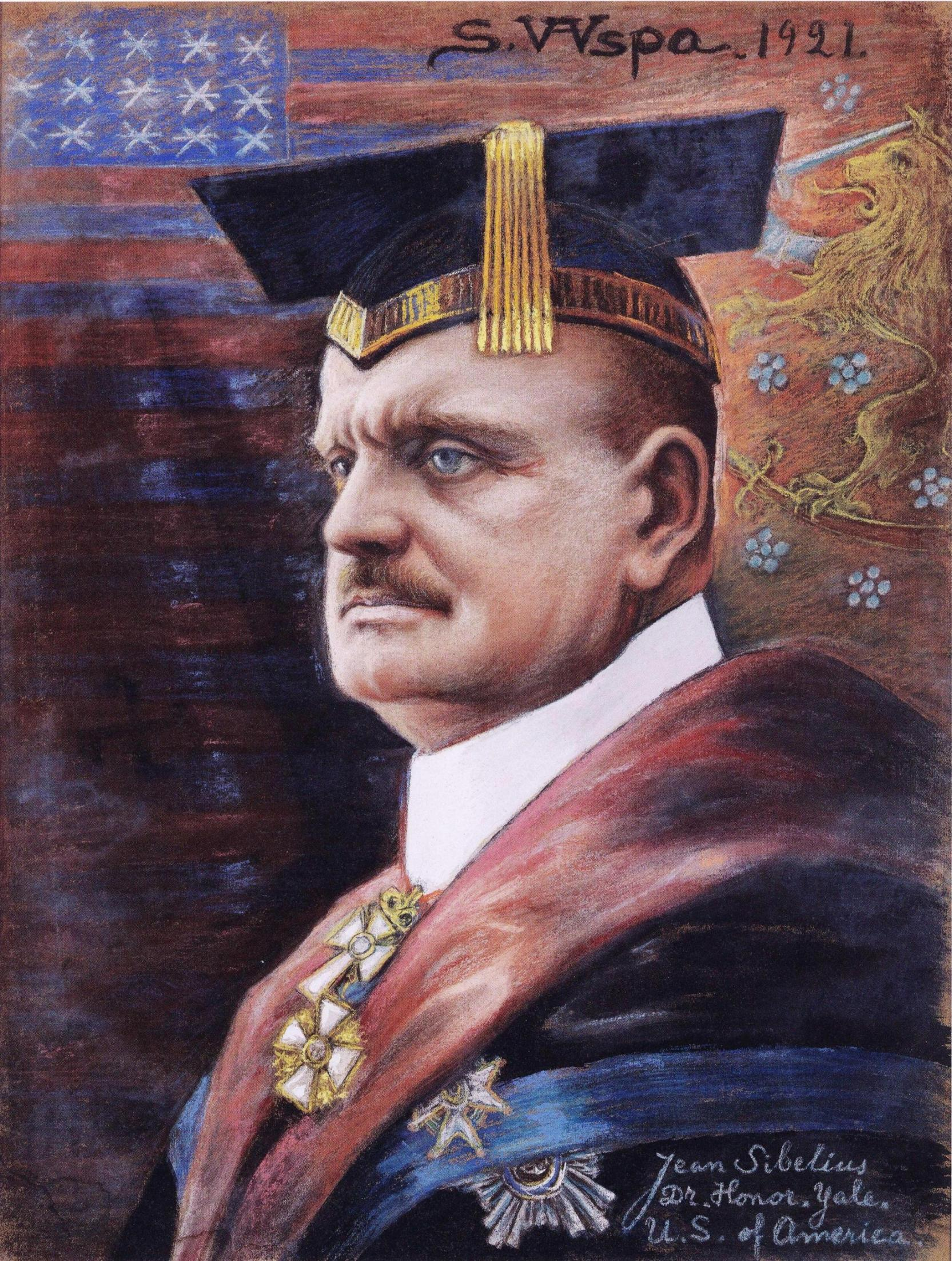 Sigurd Wettenhovi-Aspan maalaama muotokuva säveltäjä Jean Sibeliuksesta amerikkalaisen Yalen yliopiston kunniatohtorina. Maalauksen omistaa Sibeliuksen syntymäkoti -museo Hämeenlinnassa.